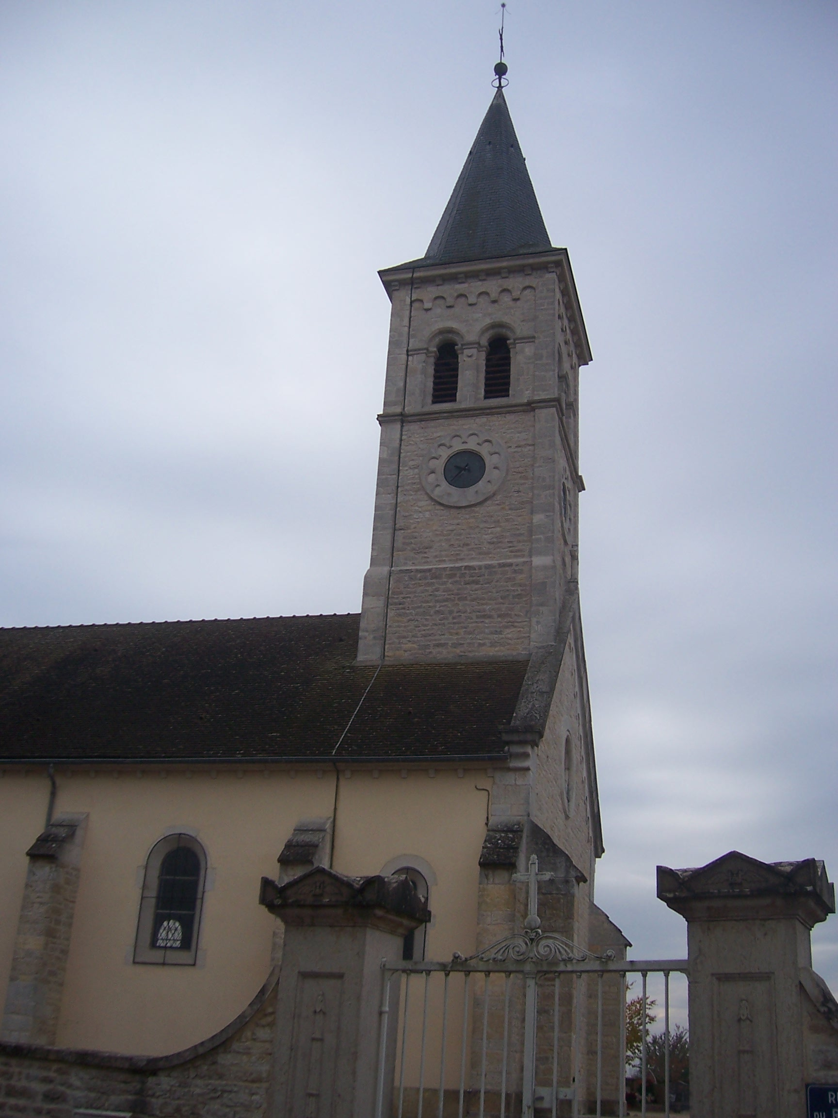 Eglise de Sevrey